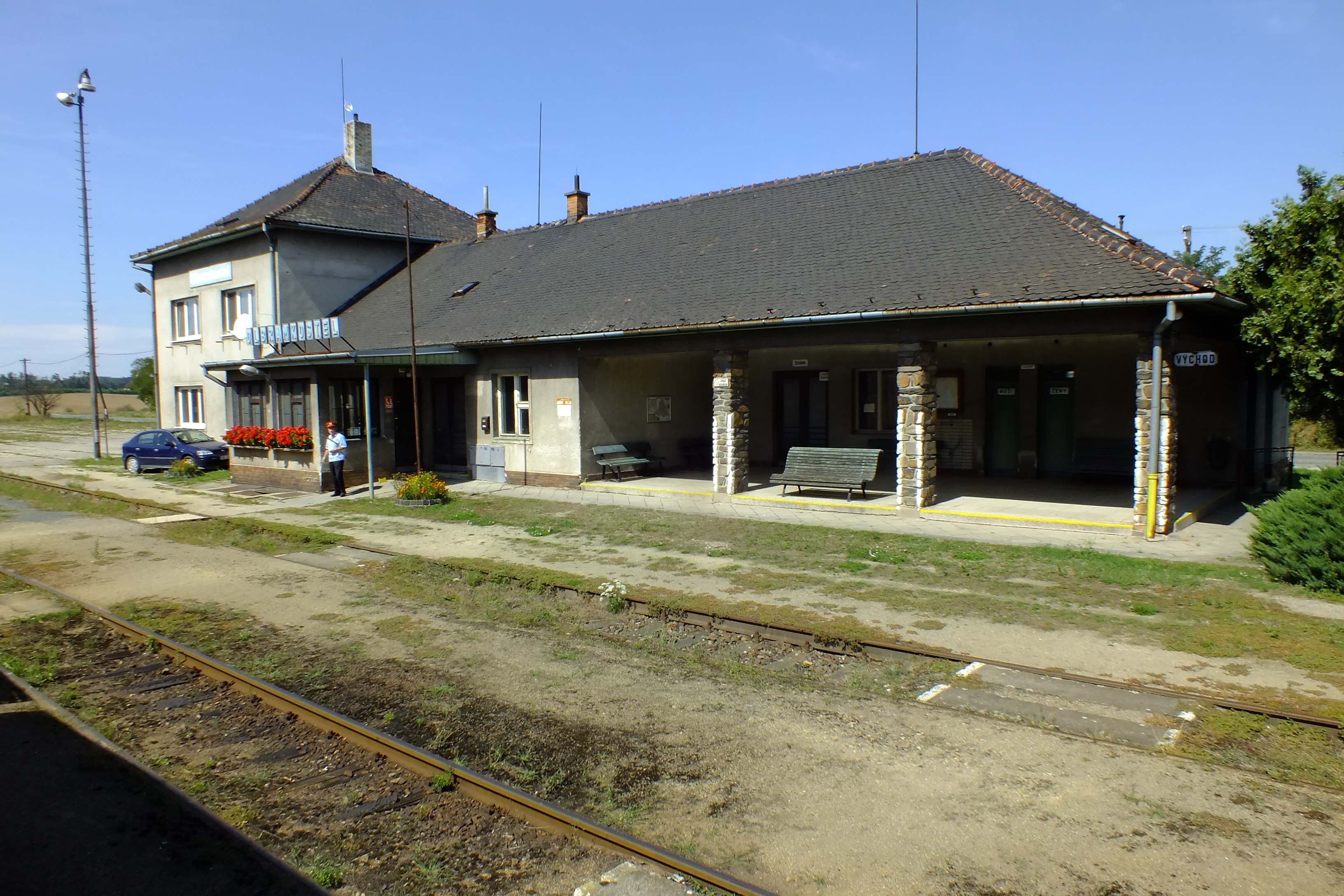 Staniční budova